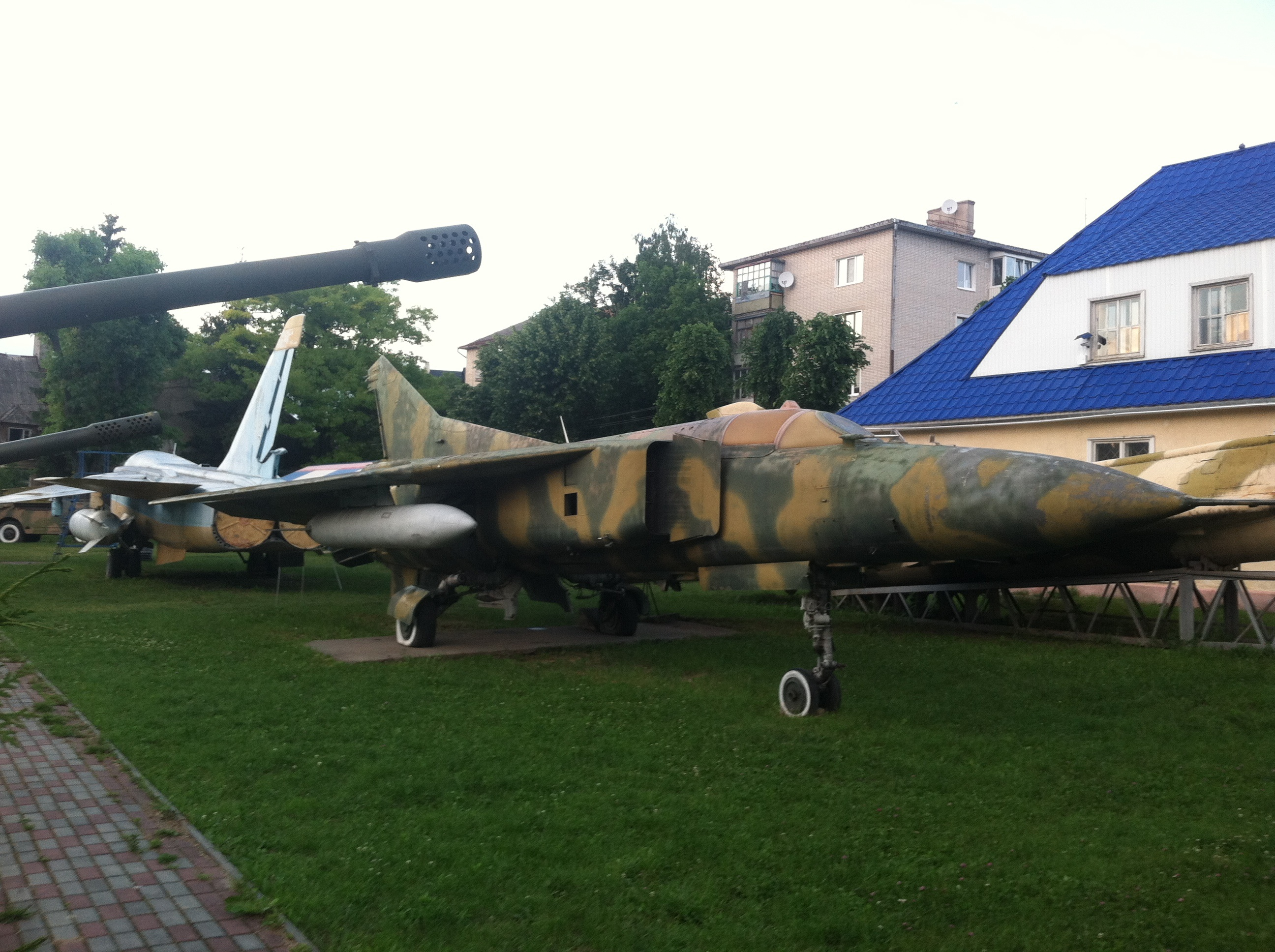 Lutsk air base in Western Ukraine.